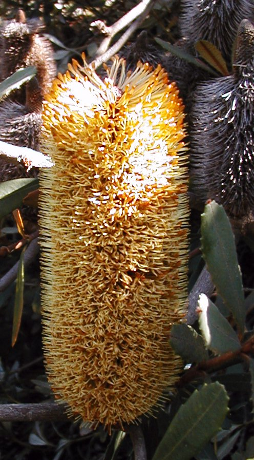 Banksia conferta var. penicillata in cultivation, Maranoa Gardens